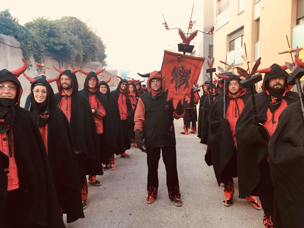 Dues files